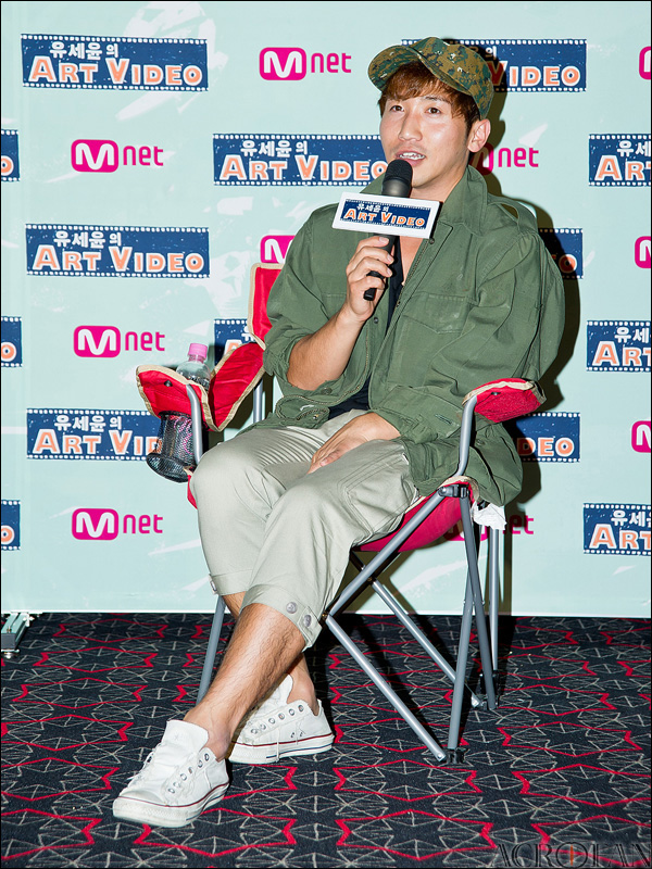 엠넷 유세윤의 아트비디오의 감독 선언식에 참석한 유세윤